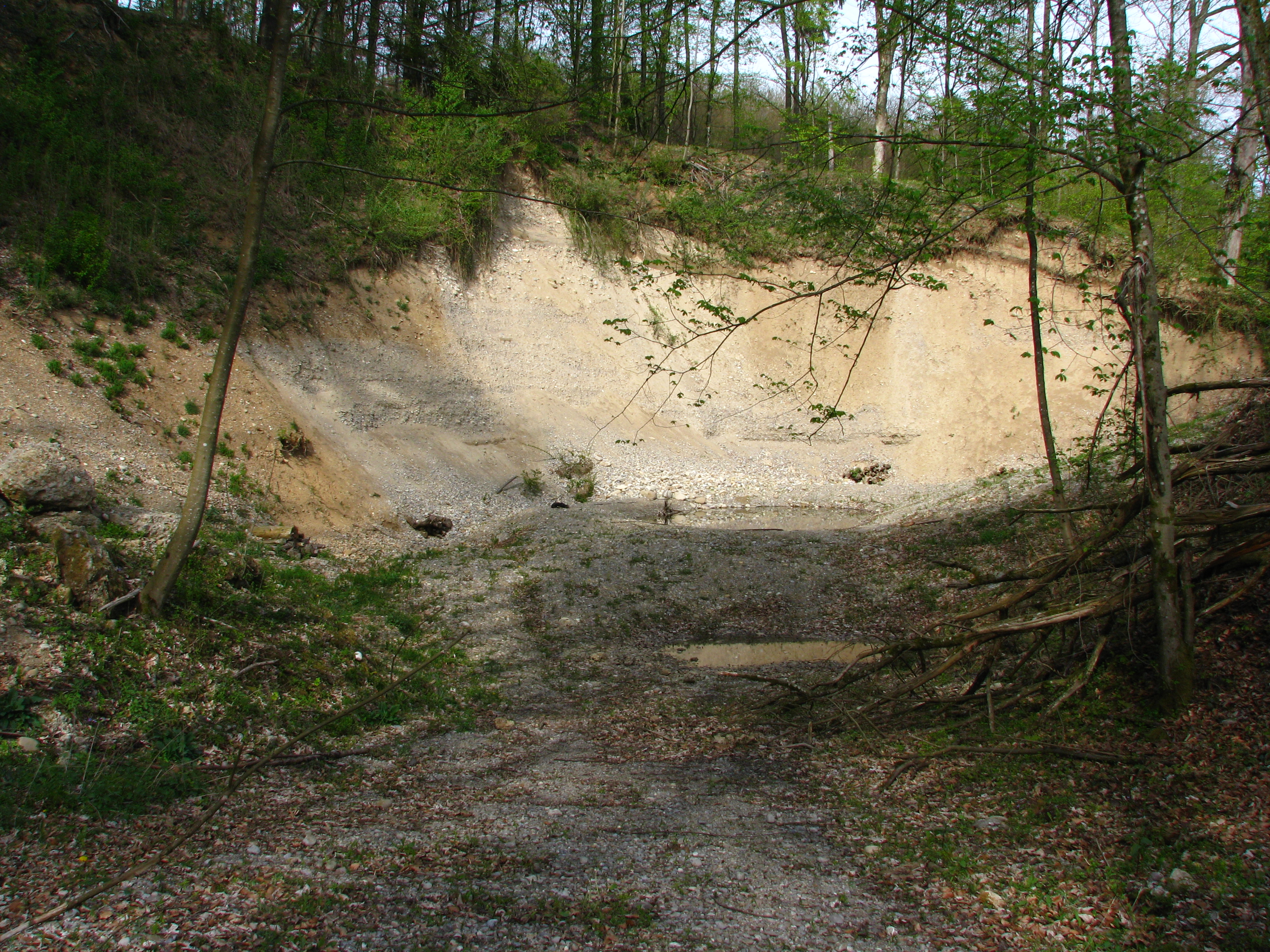 Regensdorf (Switzerland)